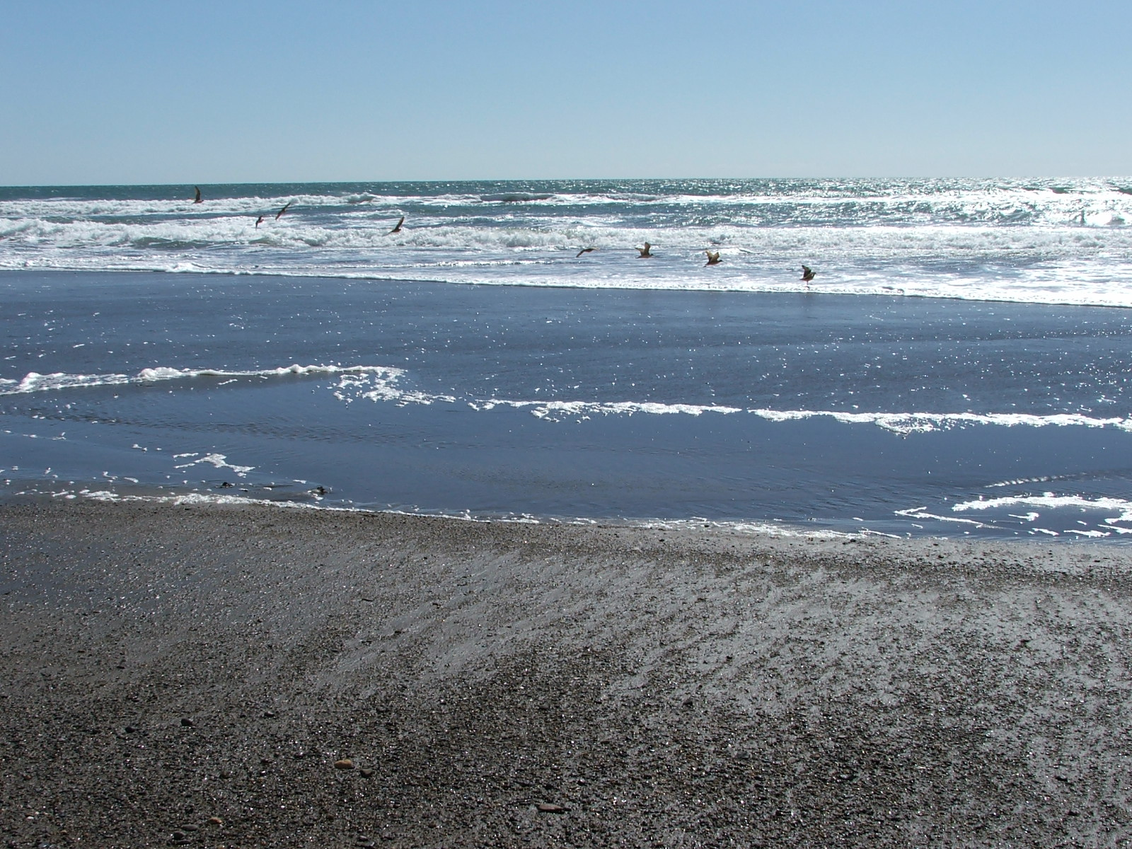 Beach/playa, Puerto Peñasco, México.